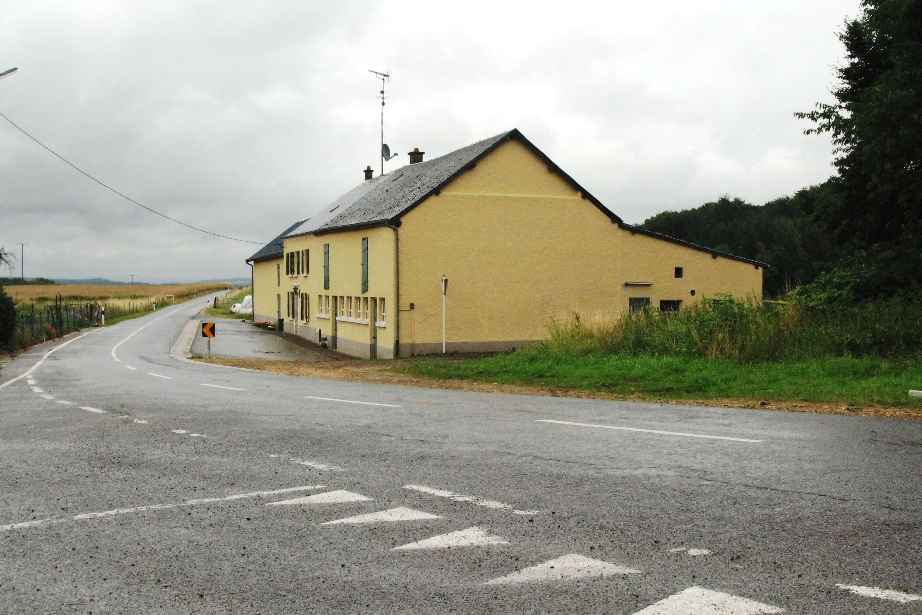 Um Bill an Direktioun Béiwen gekuckt. Bill Bill